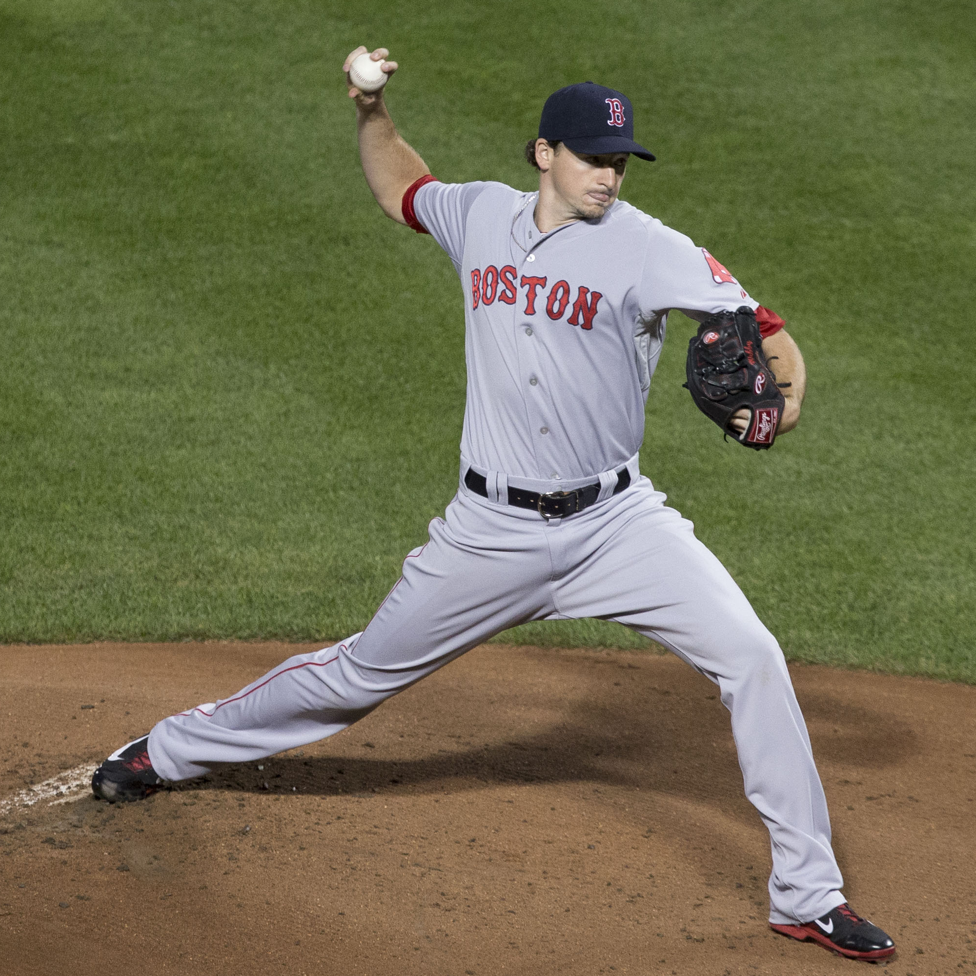 Allen Webster